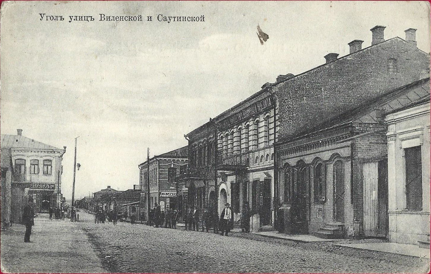 Беларуская (тарашкевіца): Барысаў (Barysaŭ), рог вуліц Віленскай (vulica Vilenskaja) і Савуцінскай (vulica Savucinskaja)